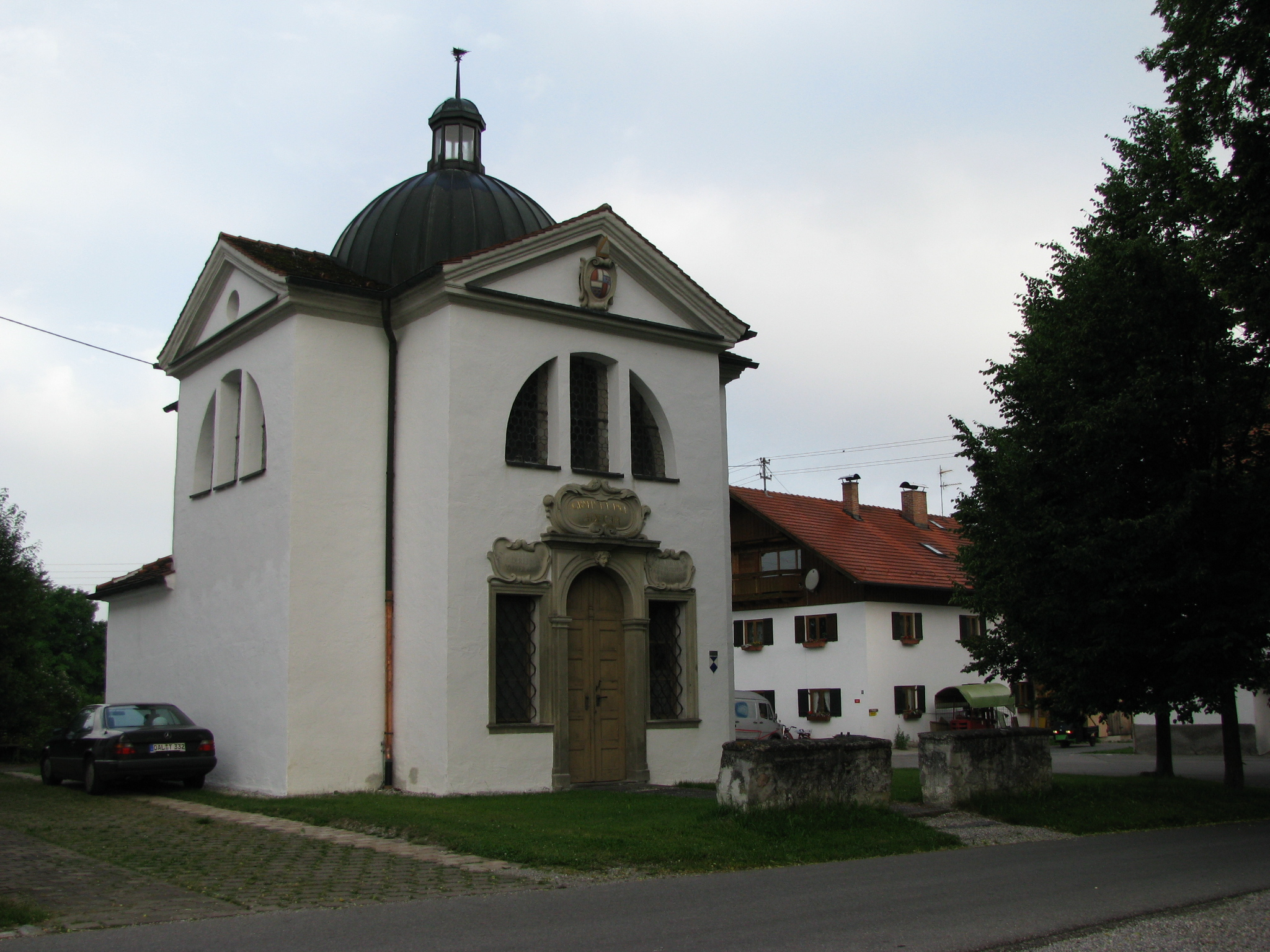 Kapelle Maria Sieben Schmerzen in Sameister bei Roßhaupten, Landkreis Ostallgäu